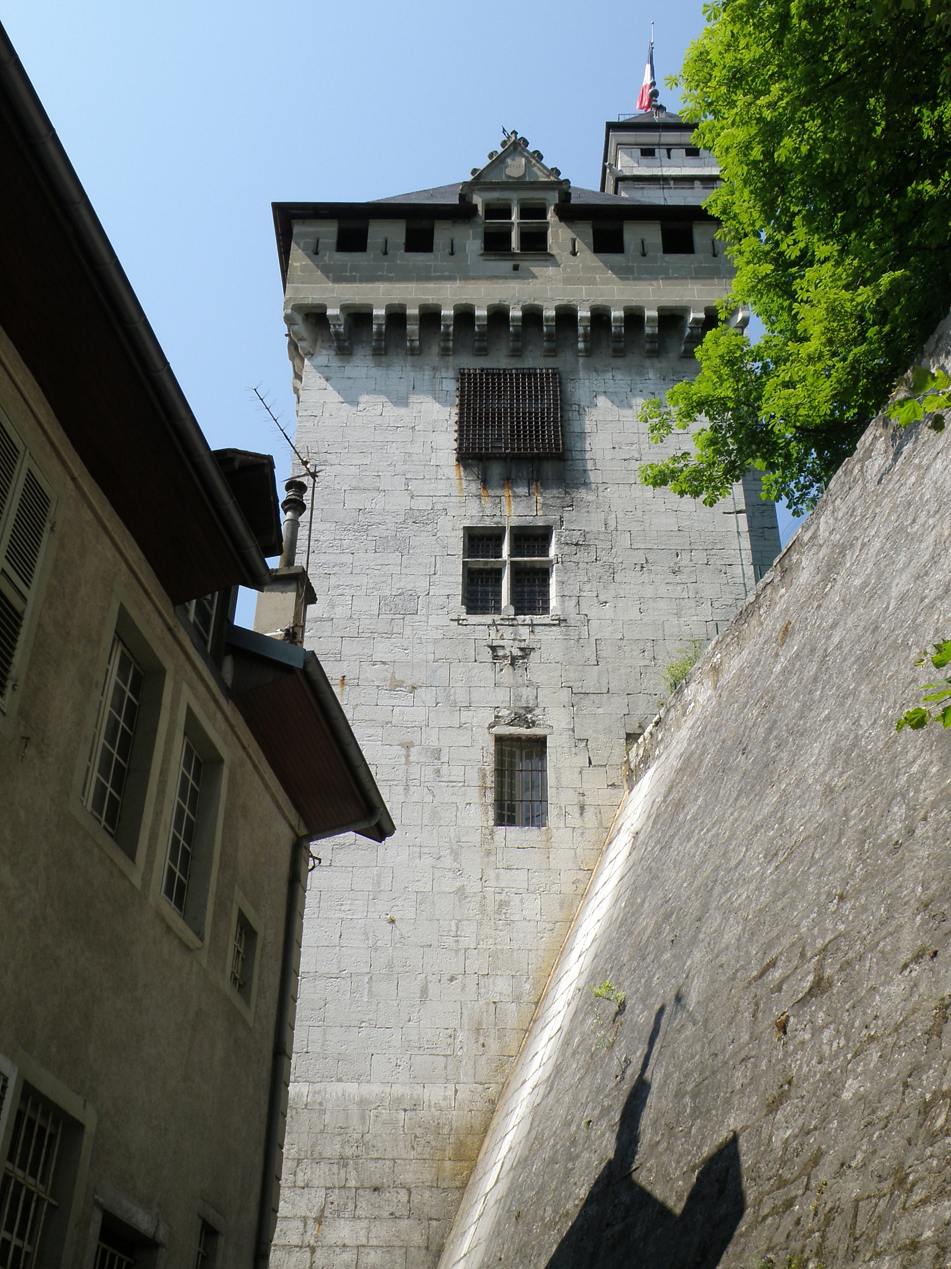 Chambéry, ville et préfecture du département de la Savoie (région Rhône-Alpes, France). Château, vu depuis la place du Château.